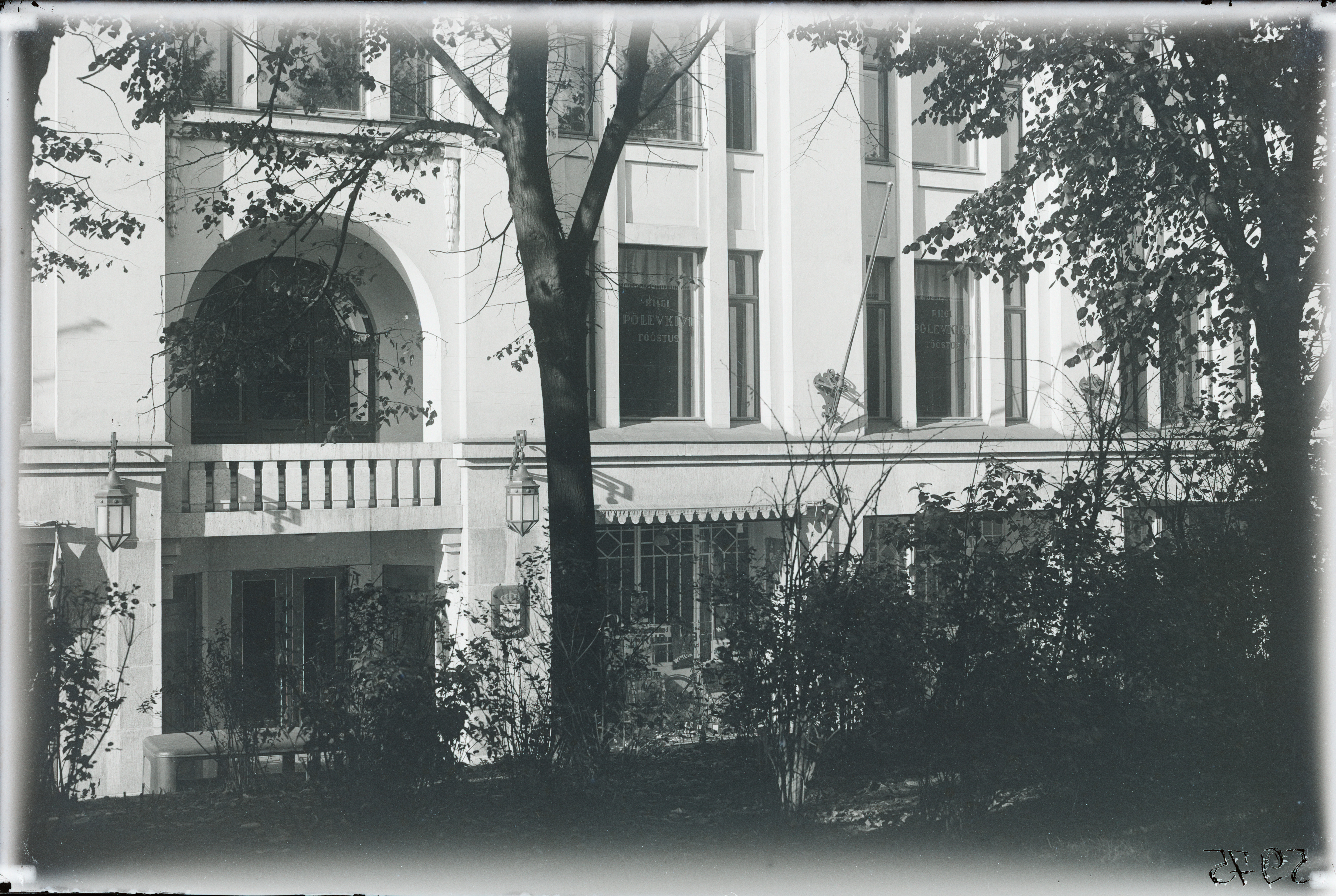 Tallinn, vaade Musumäelt Riigi Põlevkivitööstuse hoonele